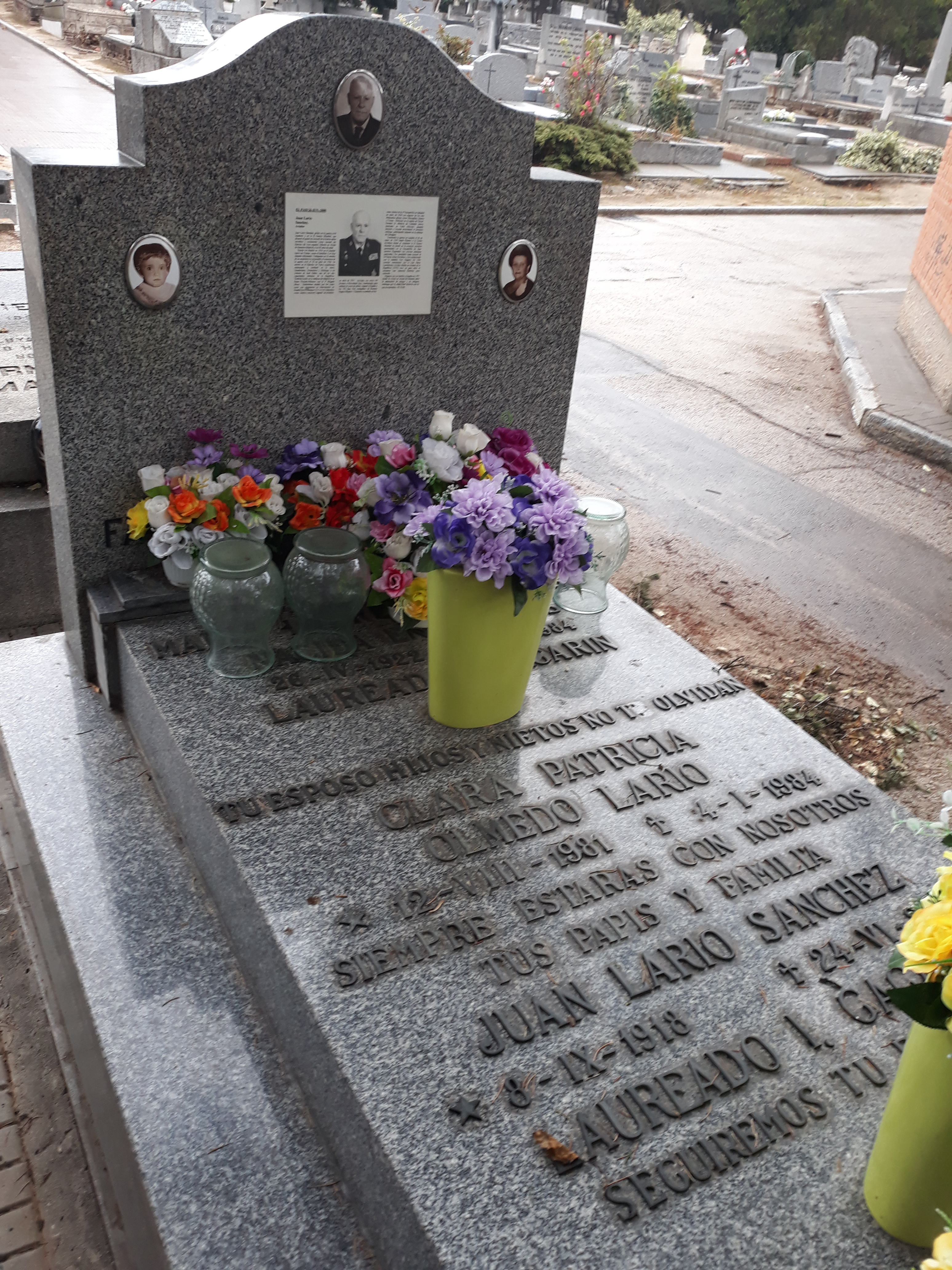 Das Grab des Luftwaffenoffiziers und Piloten der zweiten spanischen Republik Juan Lario Sanchez auf dem Cementerio civil de Madrid.